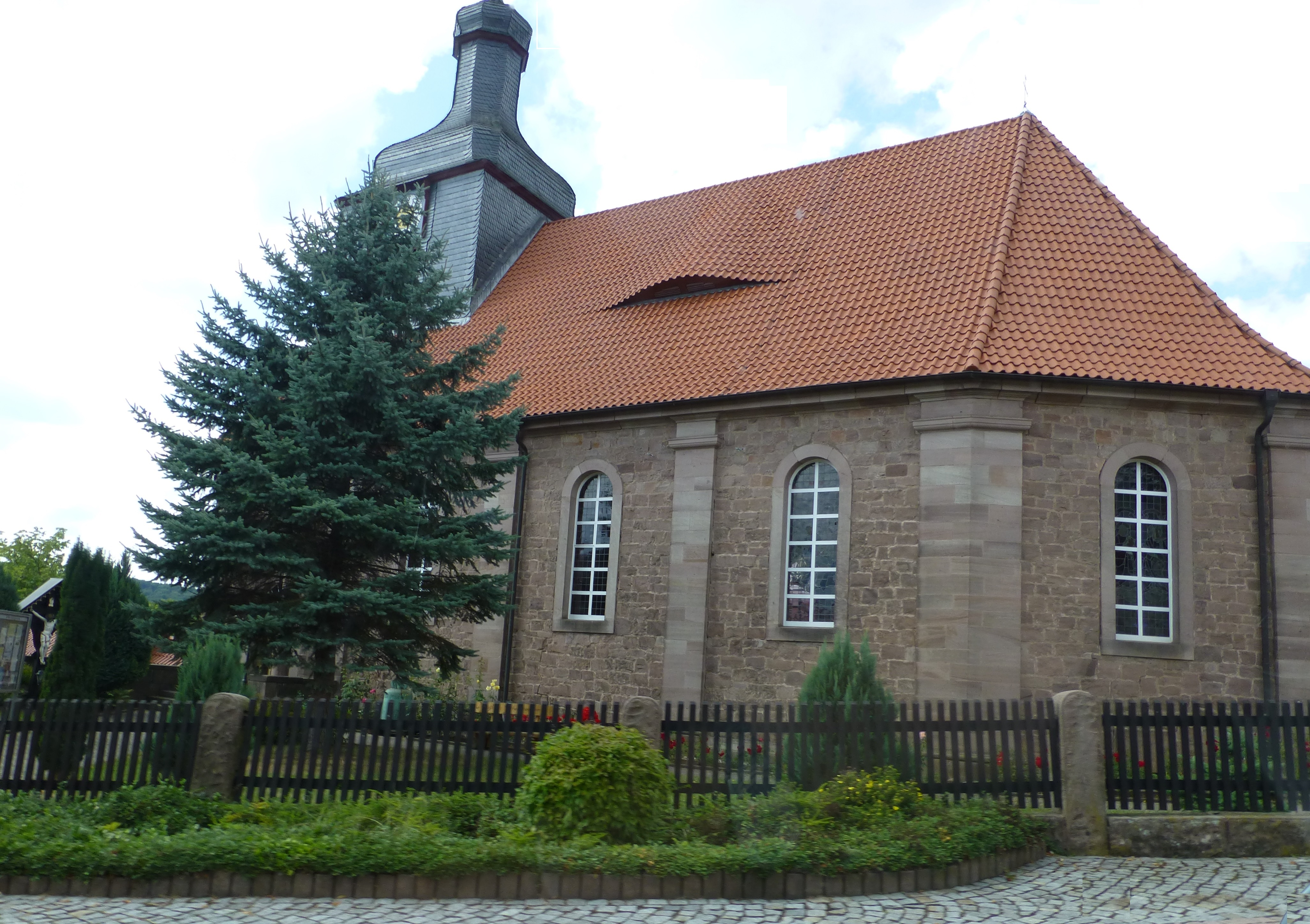 Die Kirche in Wüstheuterode